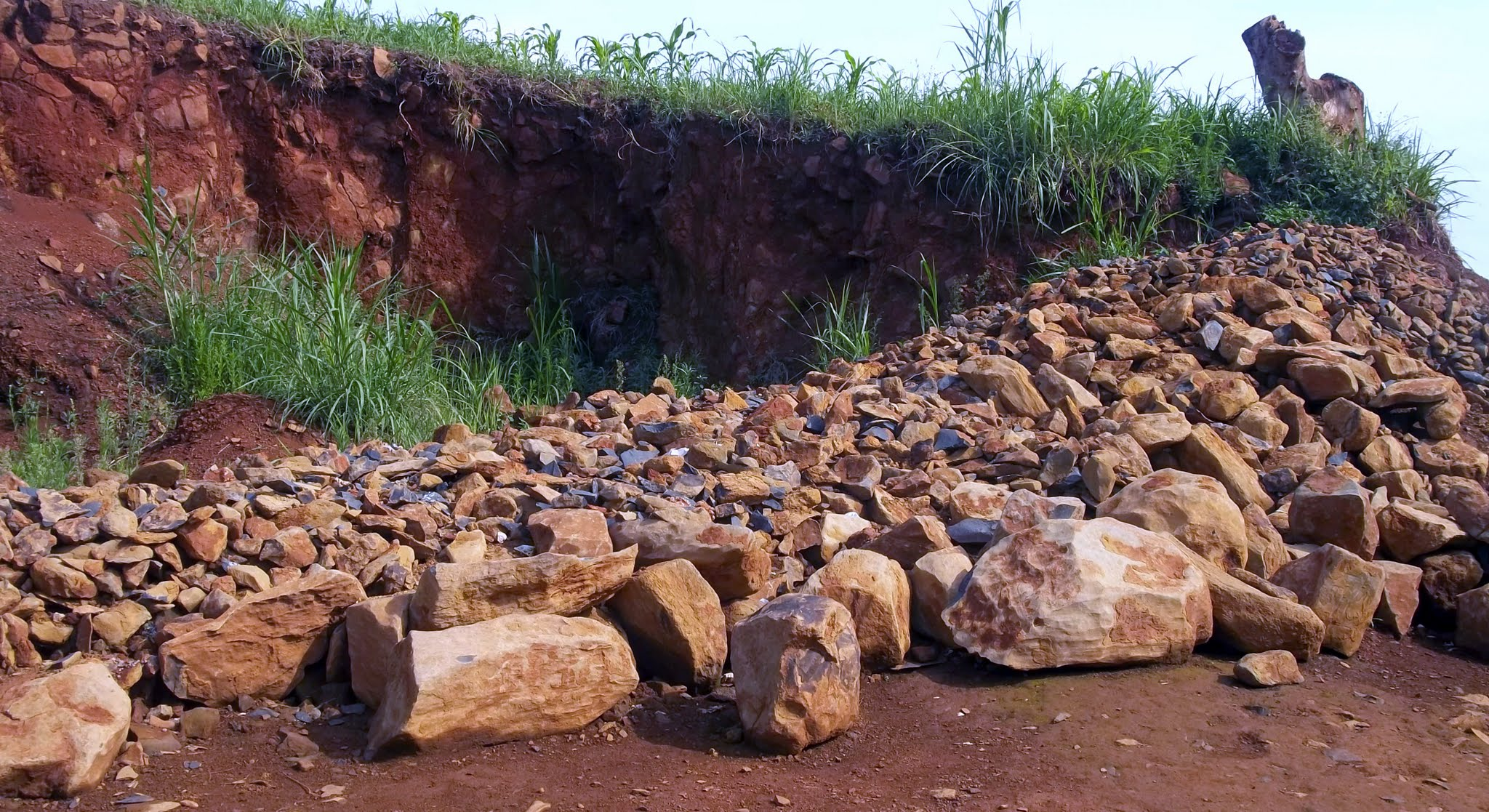 La pierre est une importante source de revenus à Bamougong